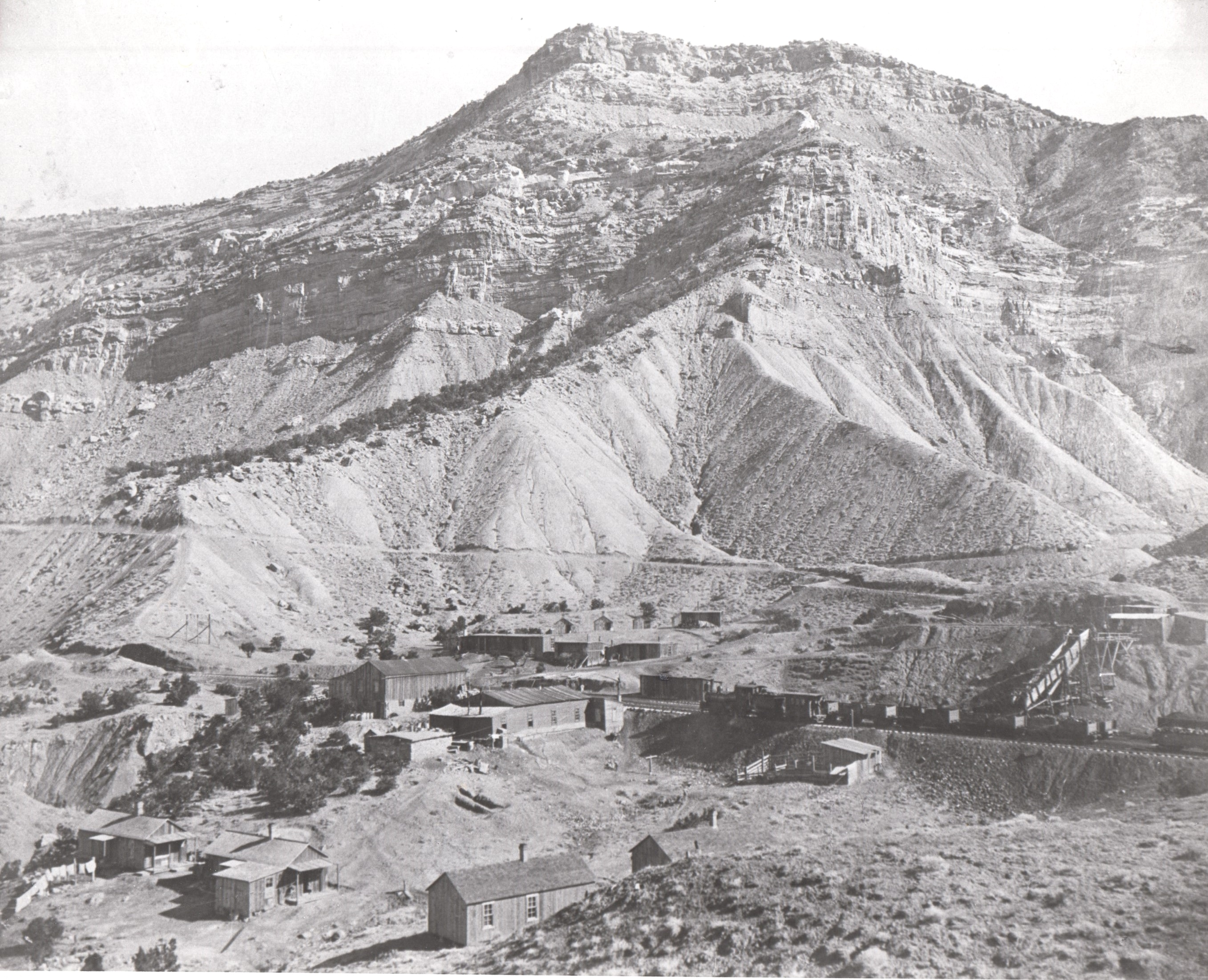 Carpenter, Colorado, ca. 1895. Grand Valley La miniera per caricare carbone nelle gondole della Little Book Cliff Railway.